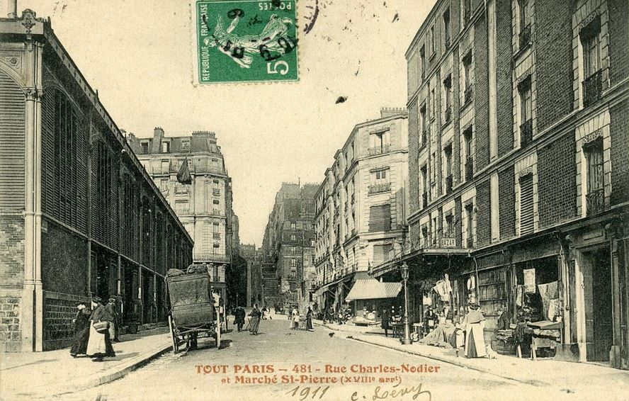 Parie, la rue Charles-Nodier en 1911